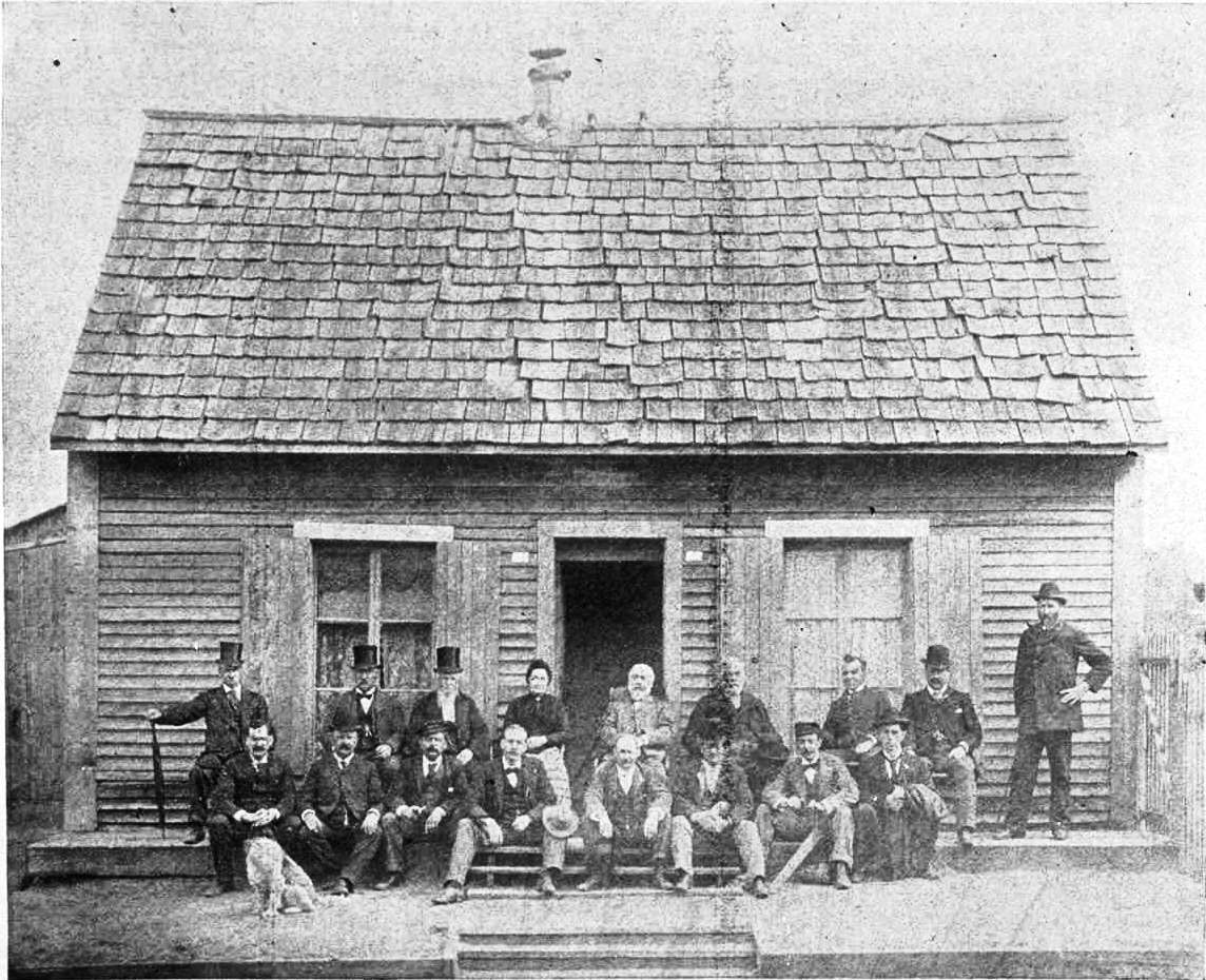 Maison de la famille Dyonnet Lorin, pionniers à Labelle, Québec